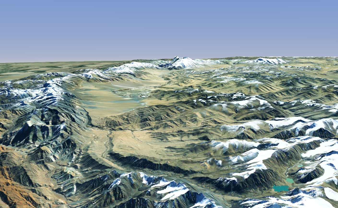 Les chaînons Kashgar (Chine, à gauche) et Sarykol (Tadjikistan, à droite), dans le Pamir.